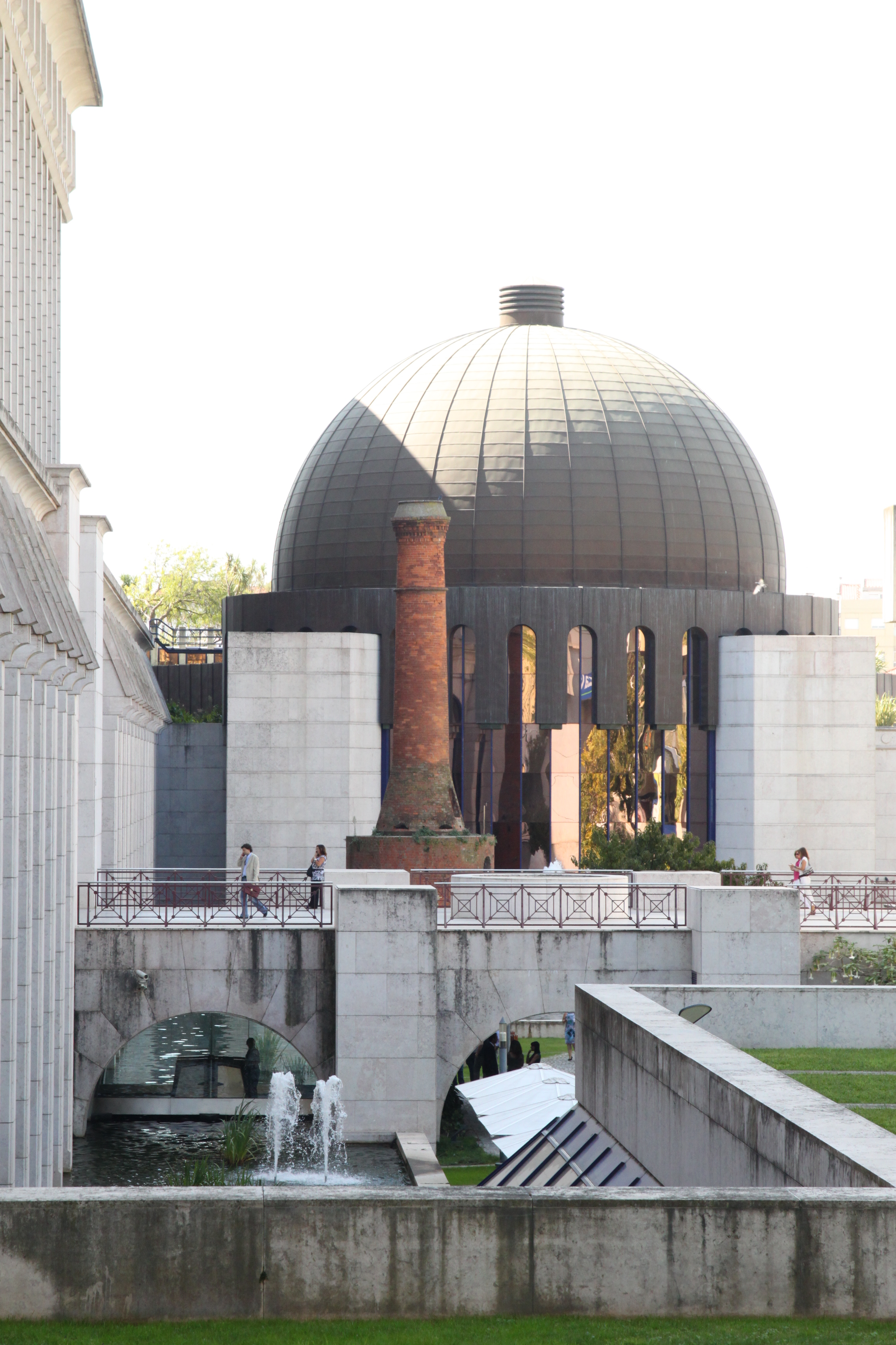 Edifício-sede da Caixa Geral de Depósitos, CGD, na Avenida João XXI This file was uploaded for Wiki Loves Monuments in Portugal with the unique identifier 97021442.